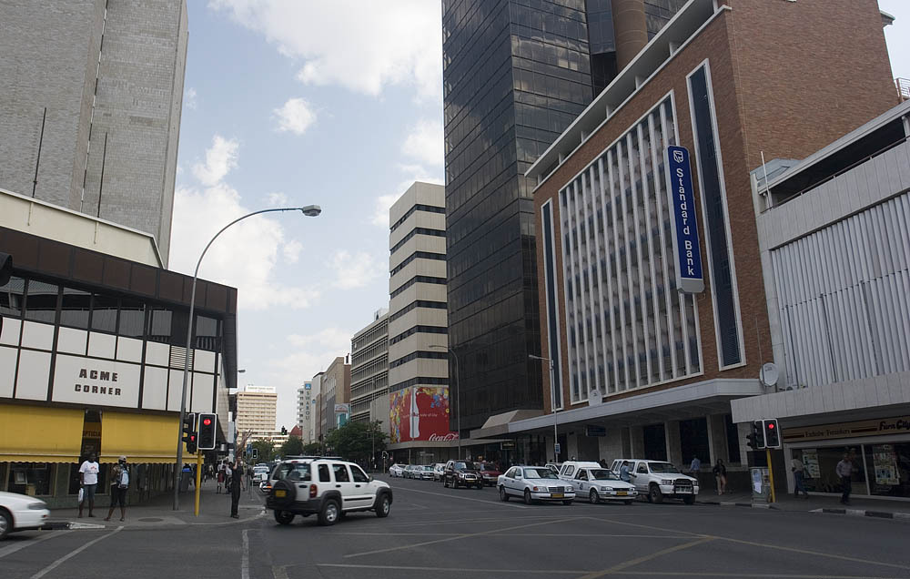 Independence Avenue, Windhoek, Namibia